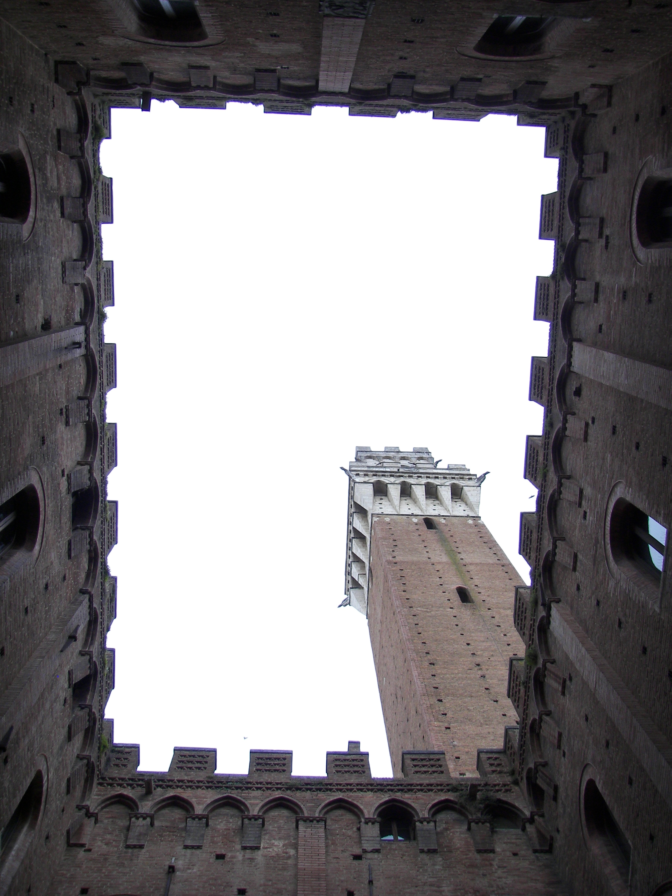 Torre del Mangia from Cortile del Podestà in the Palazzo Pubblico in Siena, Italy.